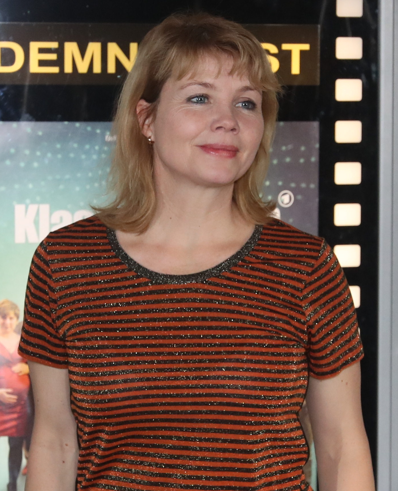 Fototermin zur Premiere des WDR-/ARD-Fernsehfilms „Klassentreffen“ in der Kulturbrauerei in Berlin